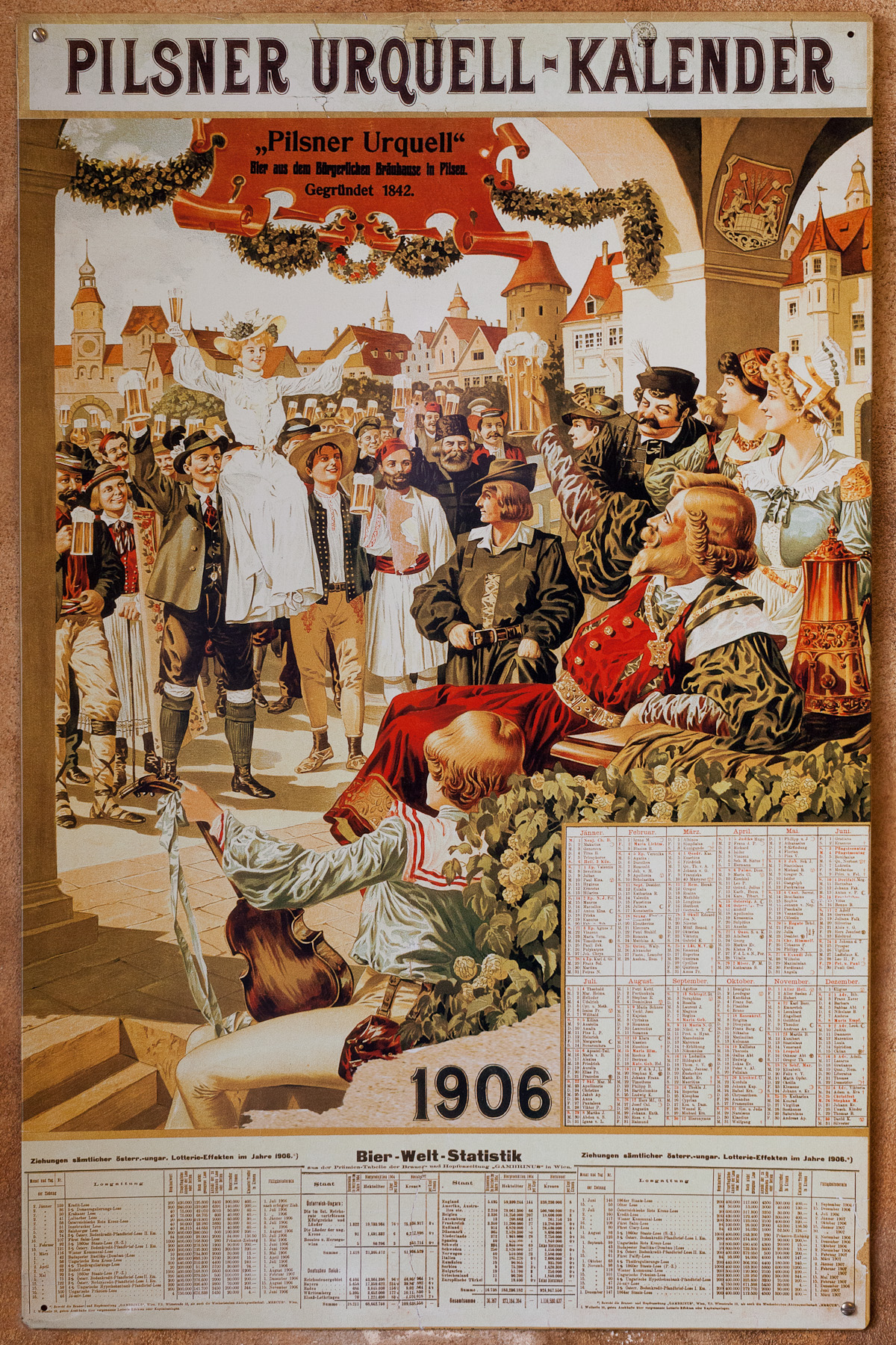 Prague